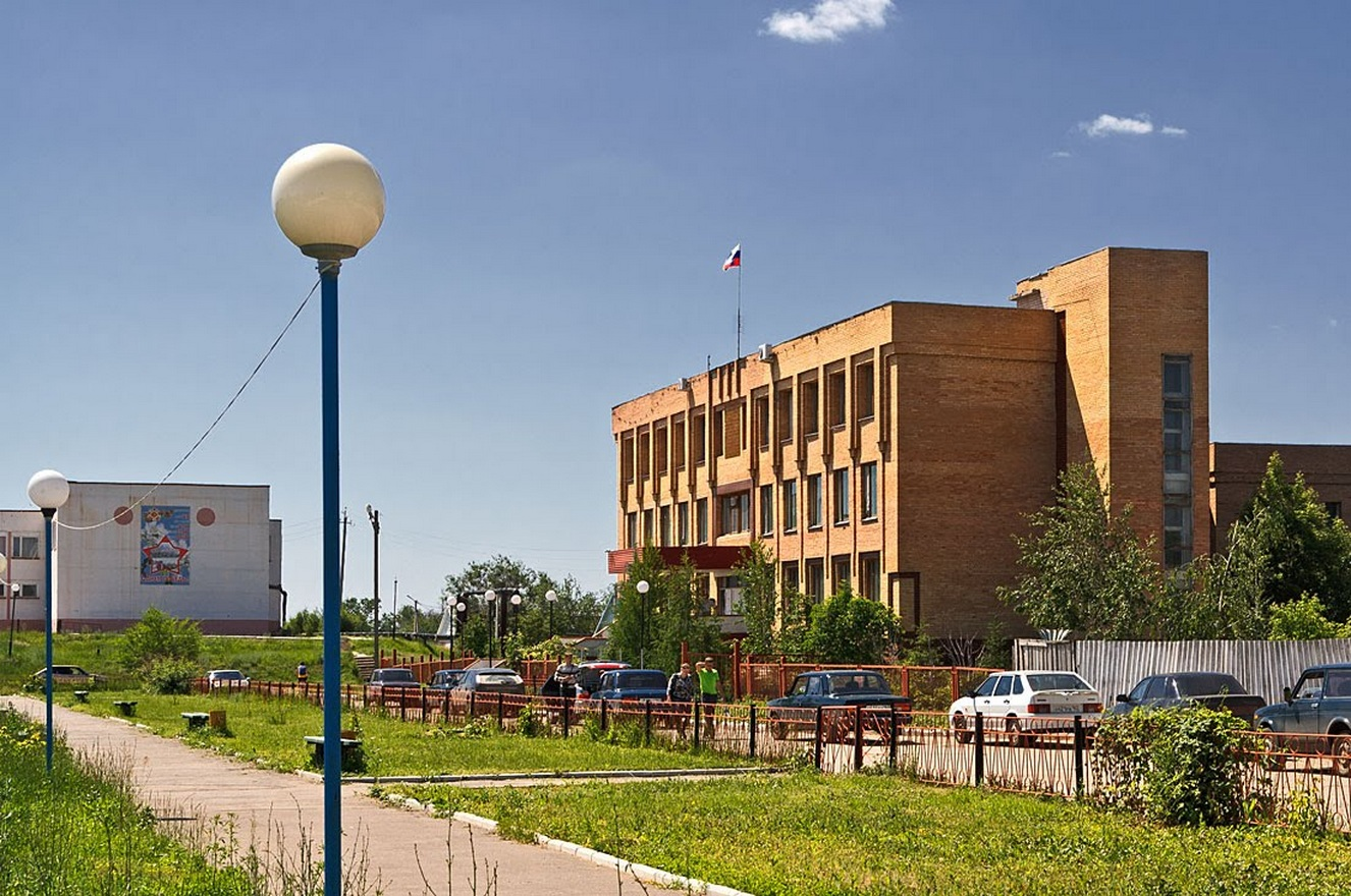 Вид на районную админстрацию с. Красноармеское.